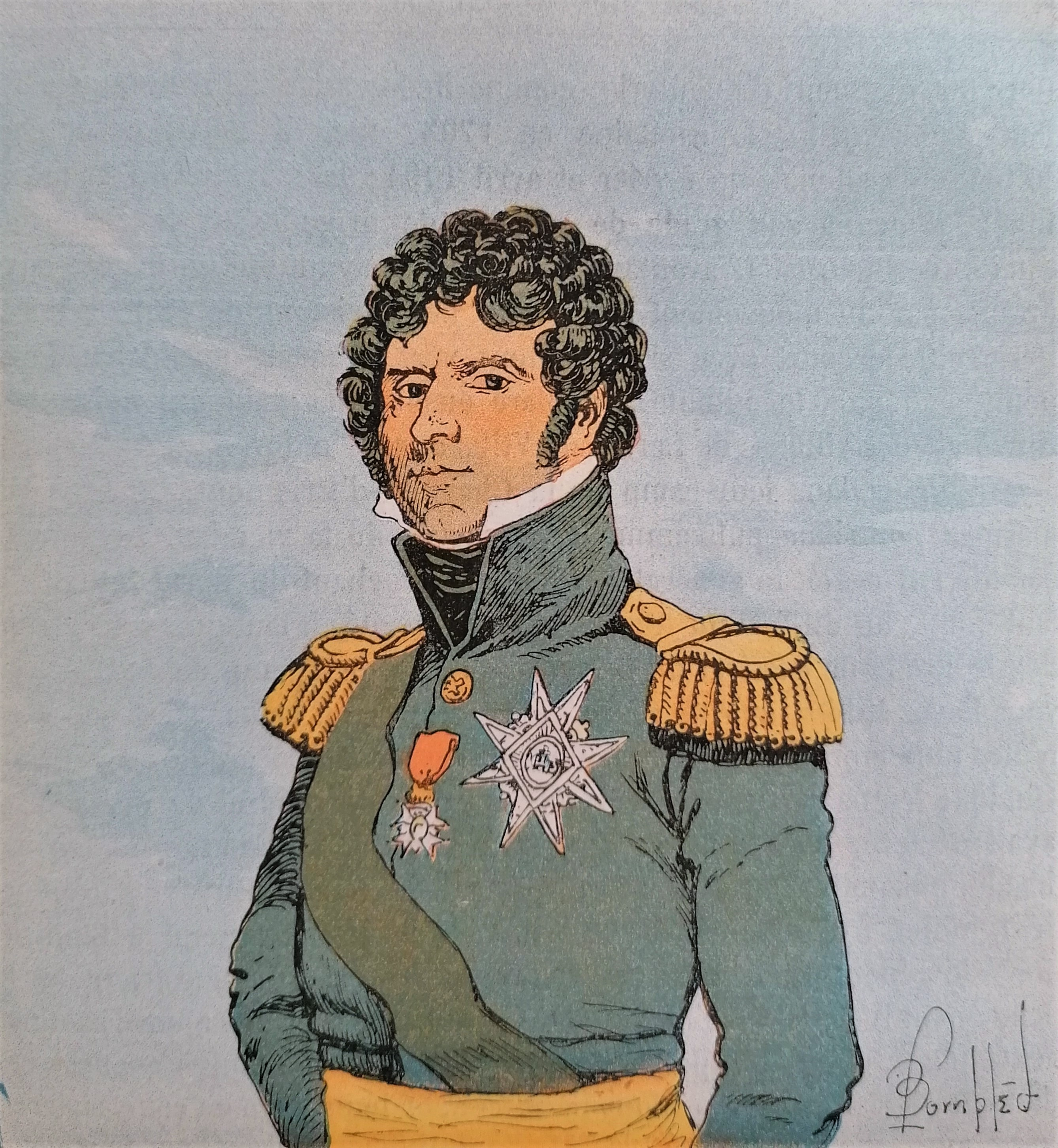 Le maréchal Jean-Baptiste Bernadotte, duc et prince de Pontecorvo.